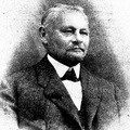 Otmar Vaňorný